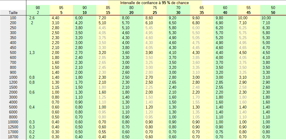 Intervalles de confiance à 95 %. En lignes : tailles d'échantillon; en colonnes : pourcentages estimés.